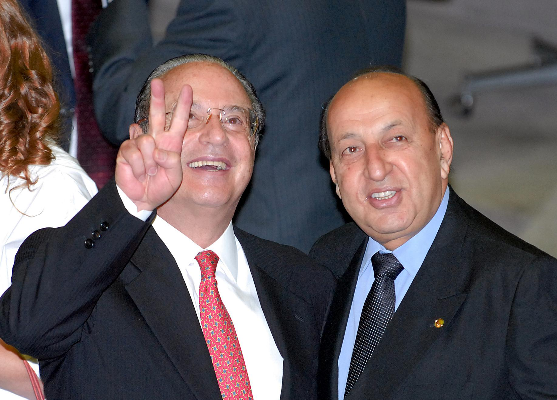 Brasília - O deputado Paulo Maluf comemora a posse na Câmara ao lado do deputado e colega do PP Simão Sessim. Foto: Roosewelt Pinheiro/ABr